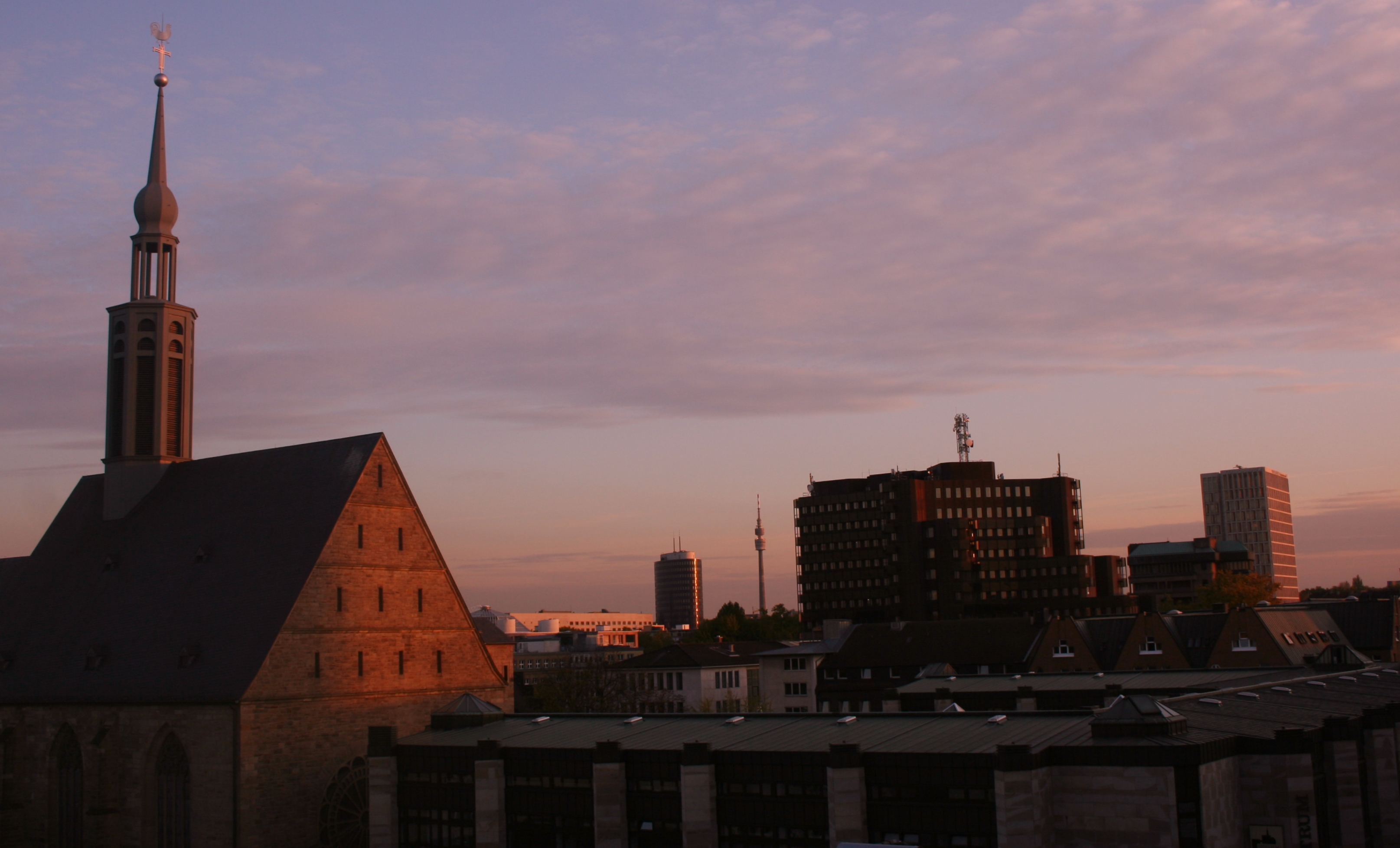 Überblick südliche Innenstadt von links nach rechts: Probsteikirche, Rathaus, Ellipson, Florianturm, RAG Haus und Volkswohlbundhaus.